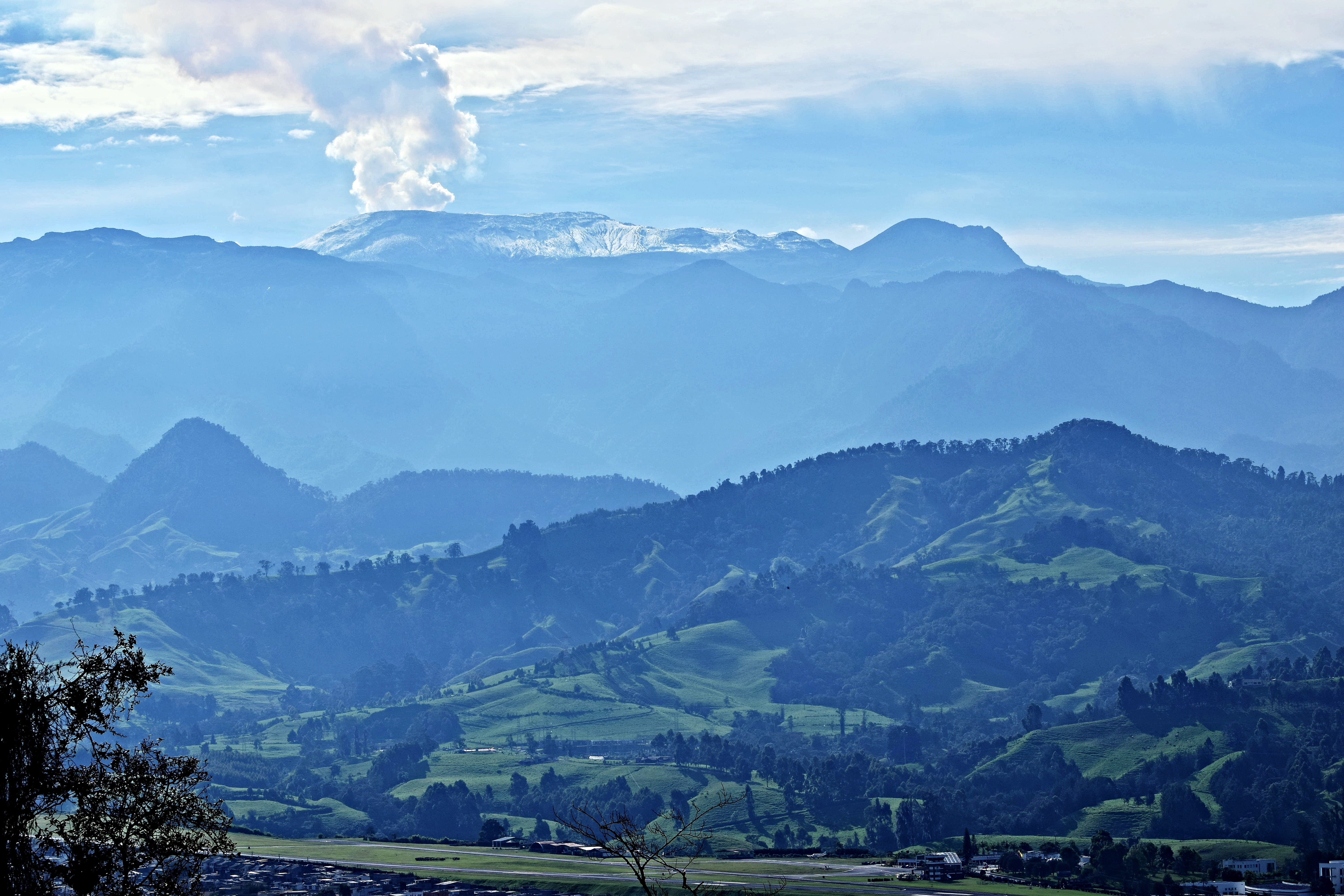 Paisaje Manizales - Aeropuerto, Nevado del Ruiz y Olleta